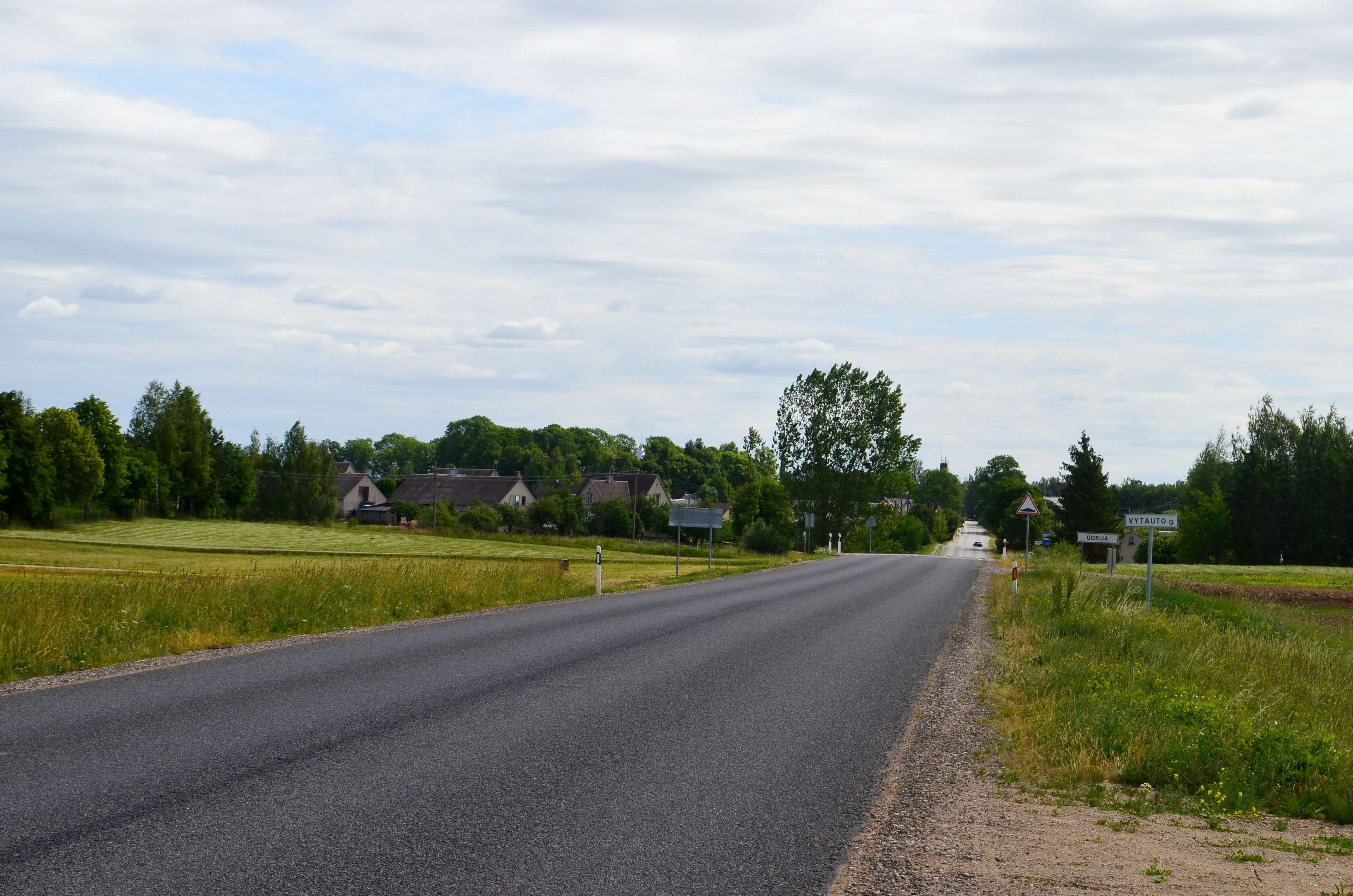 Ūdrija, Alytaus raj.